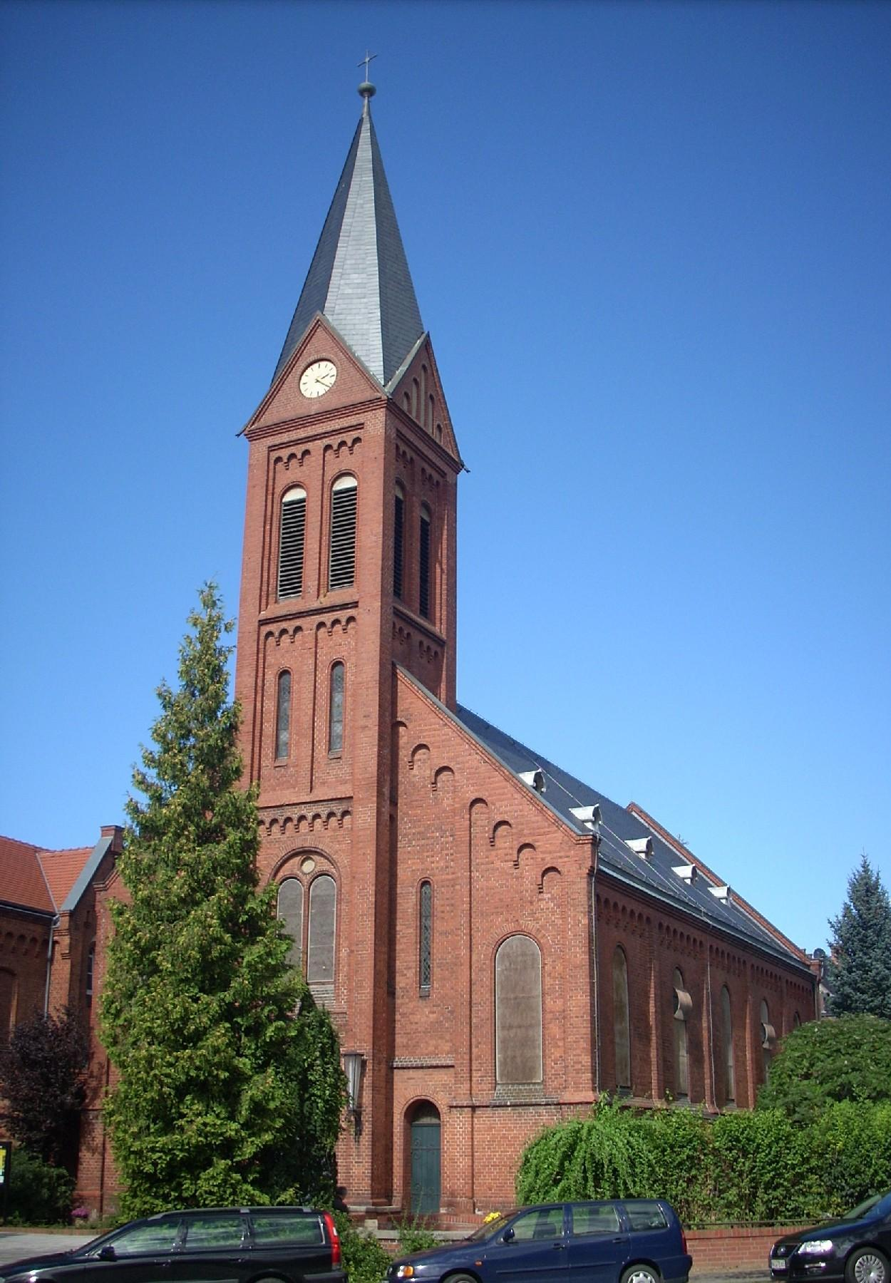 Wismar, Kath. Kirche St. Laurentius, neuromanisch